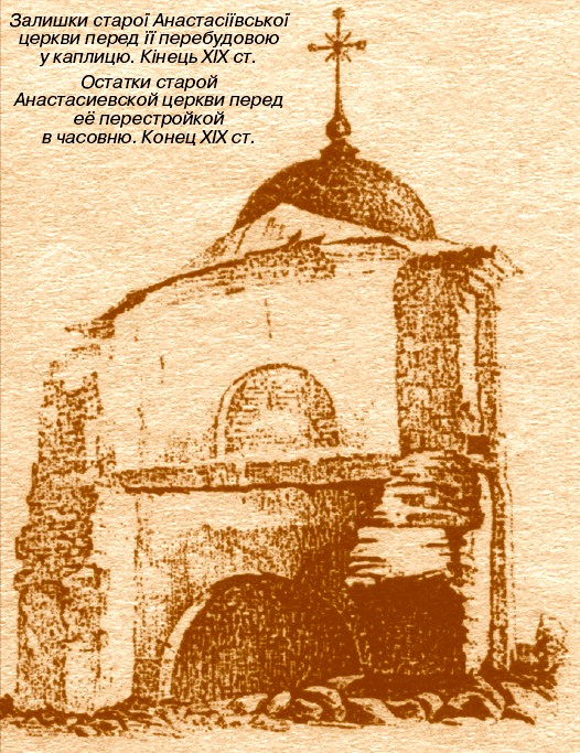 Руїни гетьманської Анастасіївської церкви в 1890-х роках